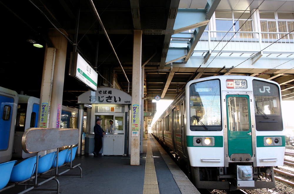 山形駅にて発車を待つ仙山線仙台行き快速列車